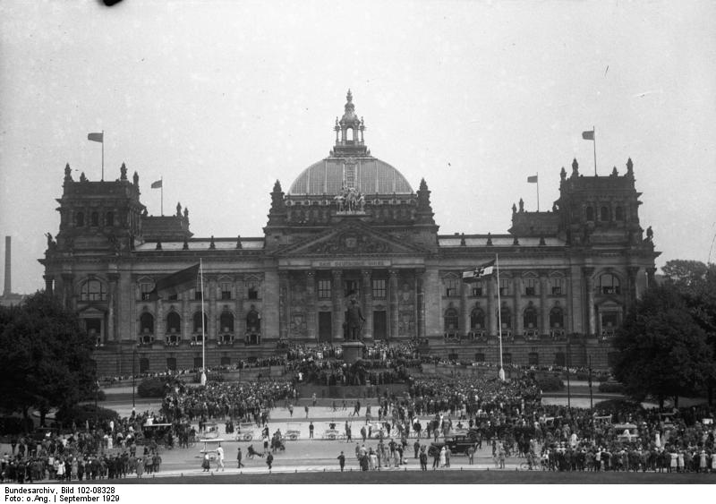 Das deutsche Reichstagsgebäude in Berlin, auf welches ein Bomben-Attentat verübt wurde. Der Schaden ist gering. Auf die Ergreifung der Täter sind 25 tausend Mark ausgesetzt.